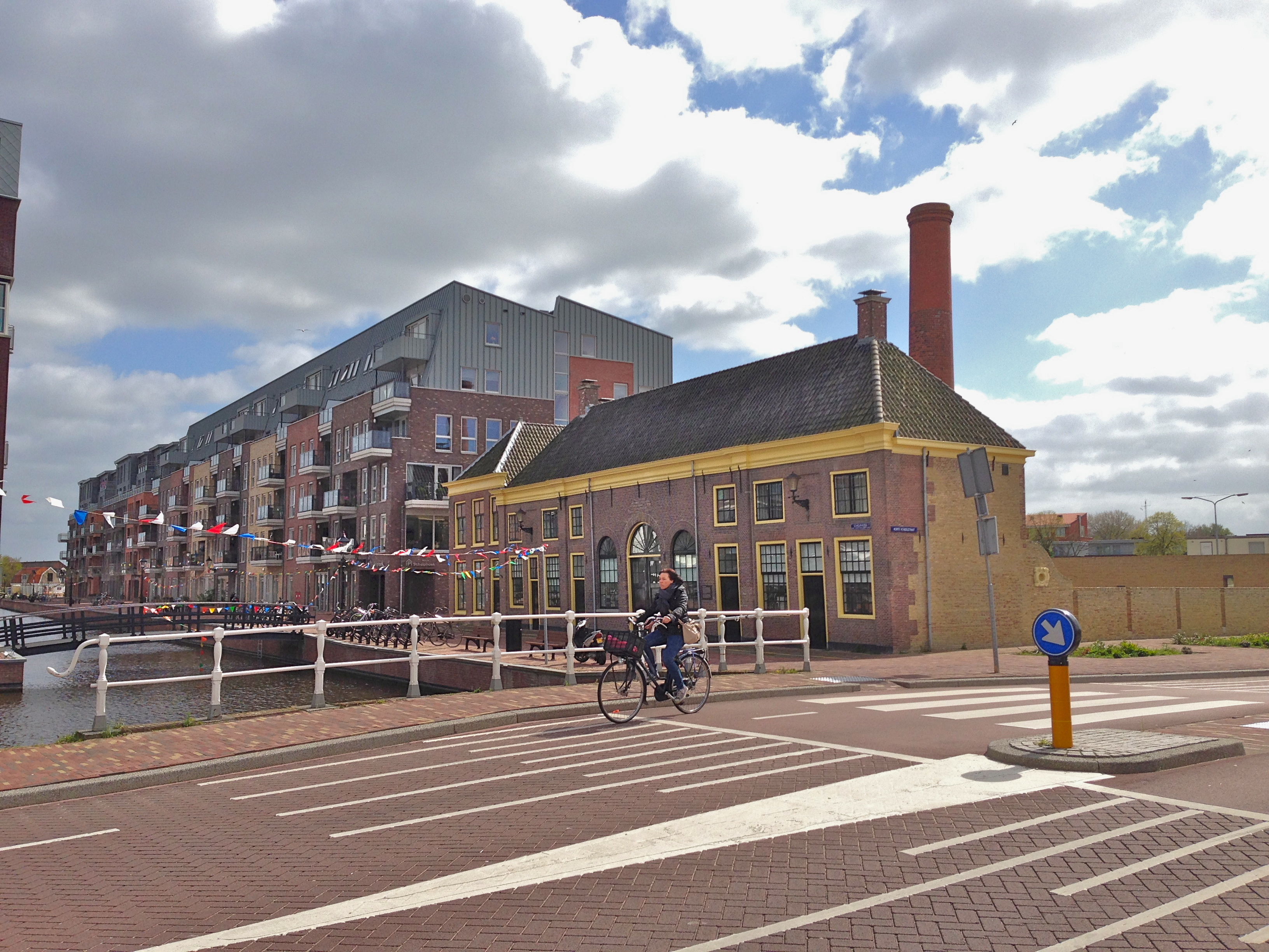 Gelegen aan de Schelphoek te Alkmaar, uitzicht op de passantenhaven van de Turfmatkt